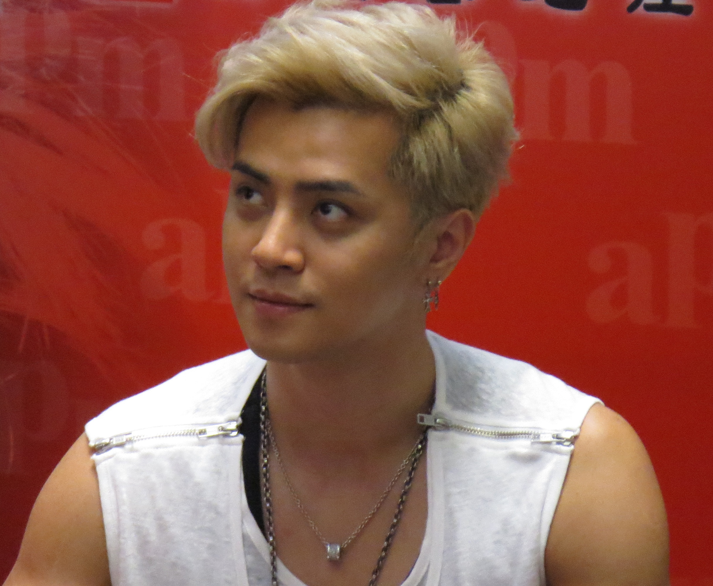 中文（香港）: 本人於2013年11月18日在羅志祥香港簽名會上拍攝